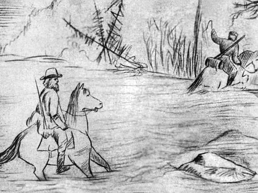 Рисунок был сделан П. А. Кропоткиным в сибирской экспедиции в период между 1862 и 1865 гг